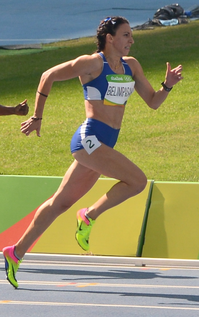 María Belibasáki dans la 4ème série du 200m des jeux olympiques de Rio 2016